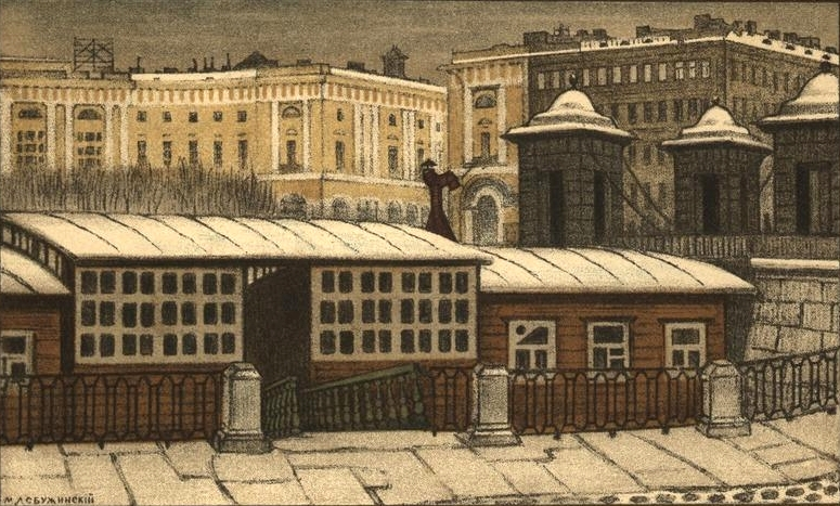 Чернышев мост.